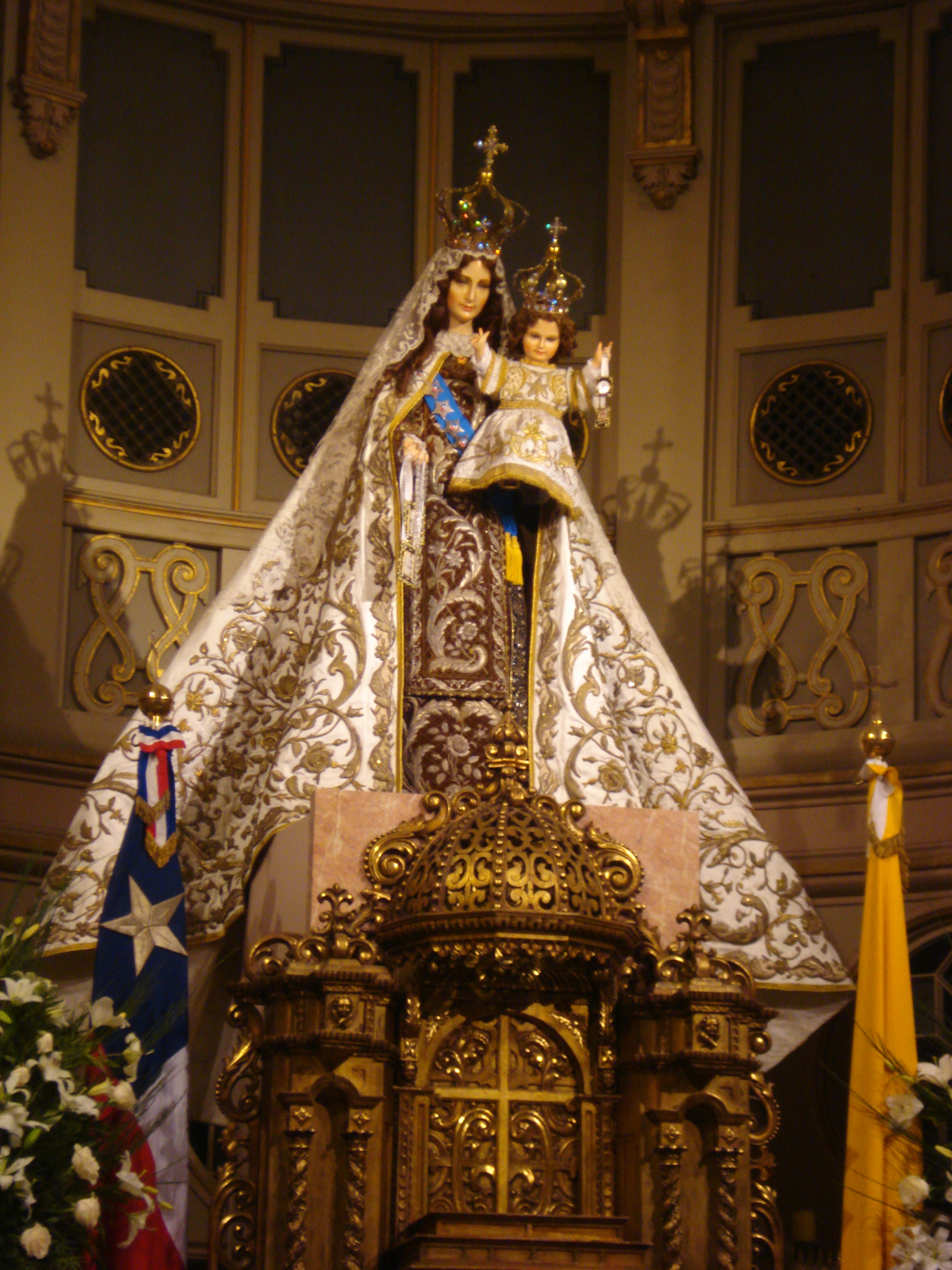 Imagen de la Virgen del Carmen en la Catedral Metropolitana de Santiago de Chile.